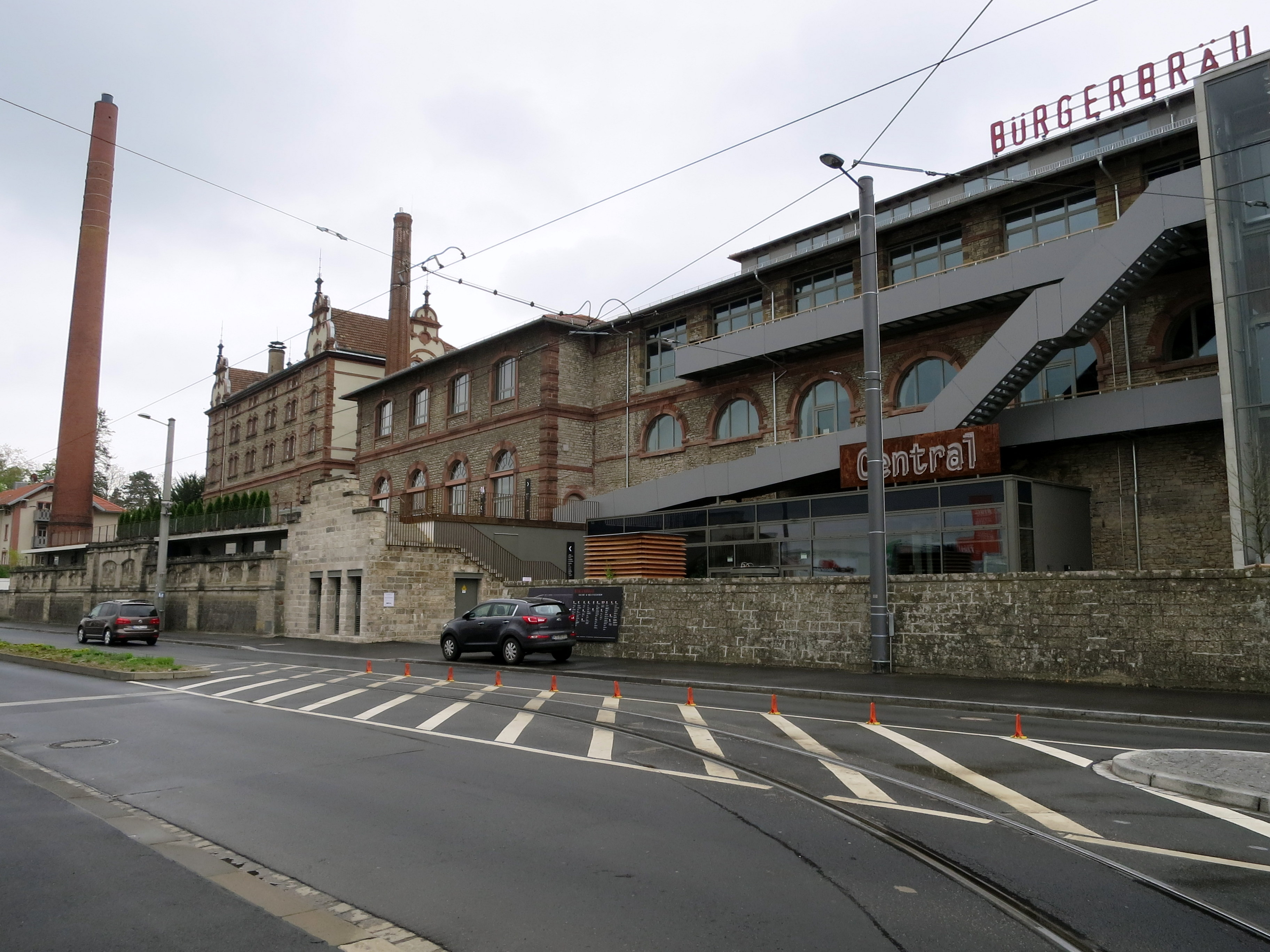 Bürgerbräu Areal, denkmalgeschützter Denkmalkomplex, jetzt Kultur- und Kreativzentrum